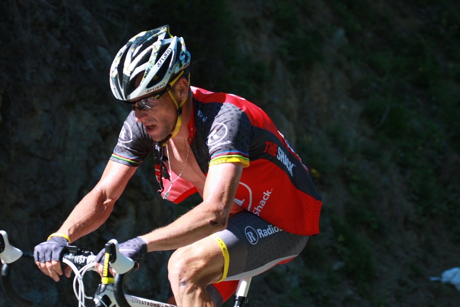 5706 lance